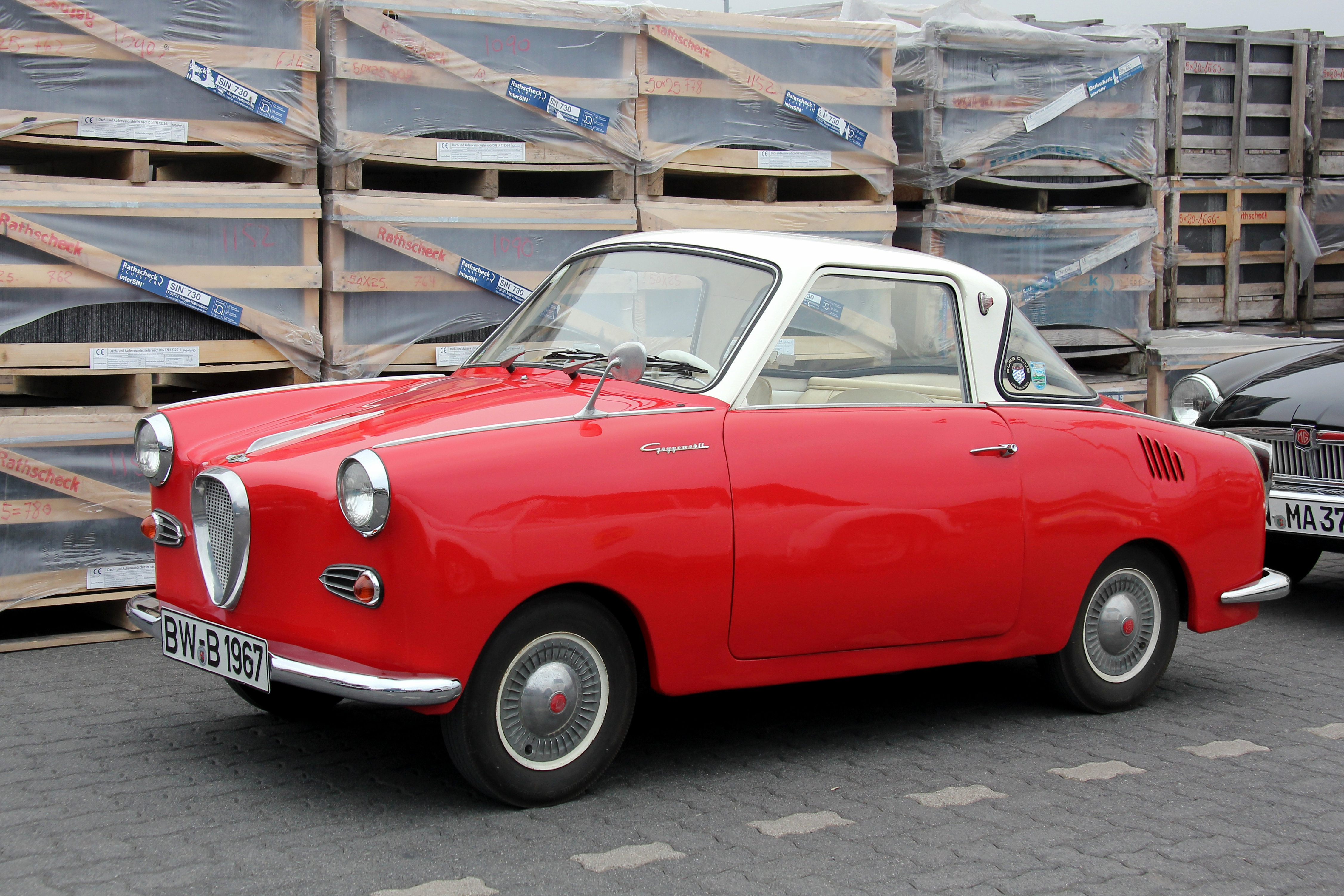 Das Goggomobil-Coupé war ein zweisitziger Kleinstwagen mit Zweizylinder-Zweitakt-Heckmotor, 247 cm³, 13,6 PS bei 5400/min, Länge 3035 mm, Breite 1370 mm, Leergewicht (ohne Fahrer) 480 kg, Höchstgeschwindigkeit 84 km/h (amtliches Kennzeichen des Fahrzeugs verändert) - enger zugeschnittene Version des Qualitätsbildes